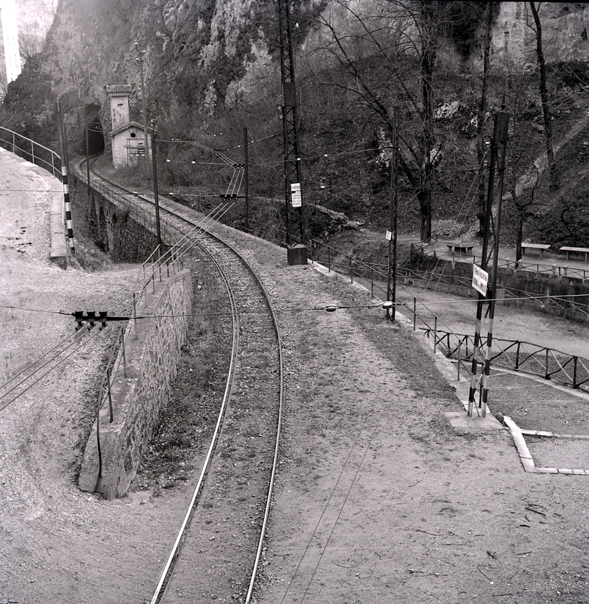 Serie fotografica : Valganna, 1975 / Paolo Monti. - Buste: 7, Fototipi: 7 : Negativo b/n, gelatina bromuro d'argento/ pellicola ; 6x6. - ((Serie costituita da 7 negativi identificati con la numerazione: 3552-3558. Sulla busta R3552 manoscritto: "Valganna/Boschi". La suddetta serie è contenuta nella scatola identificata con la numerazione R3499/3788. Sul coperchio iscrizione manoscritta a pennarello: "1 Località varie".